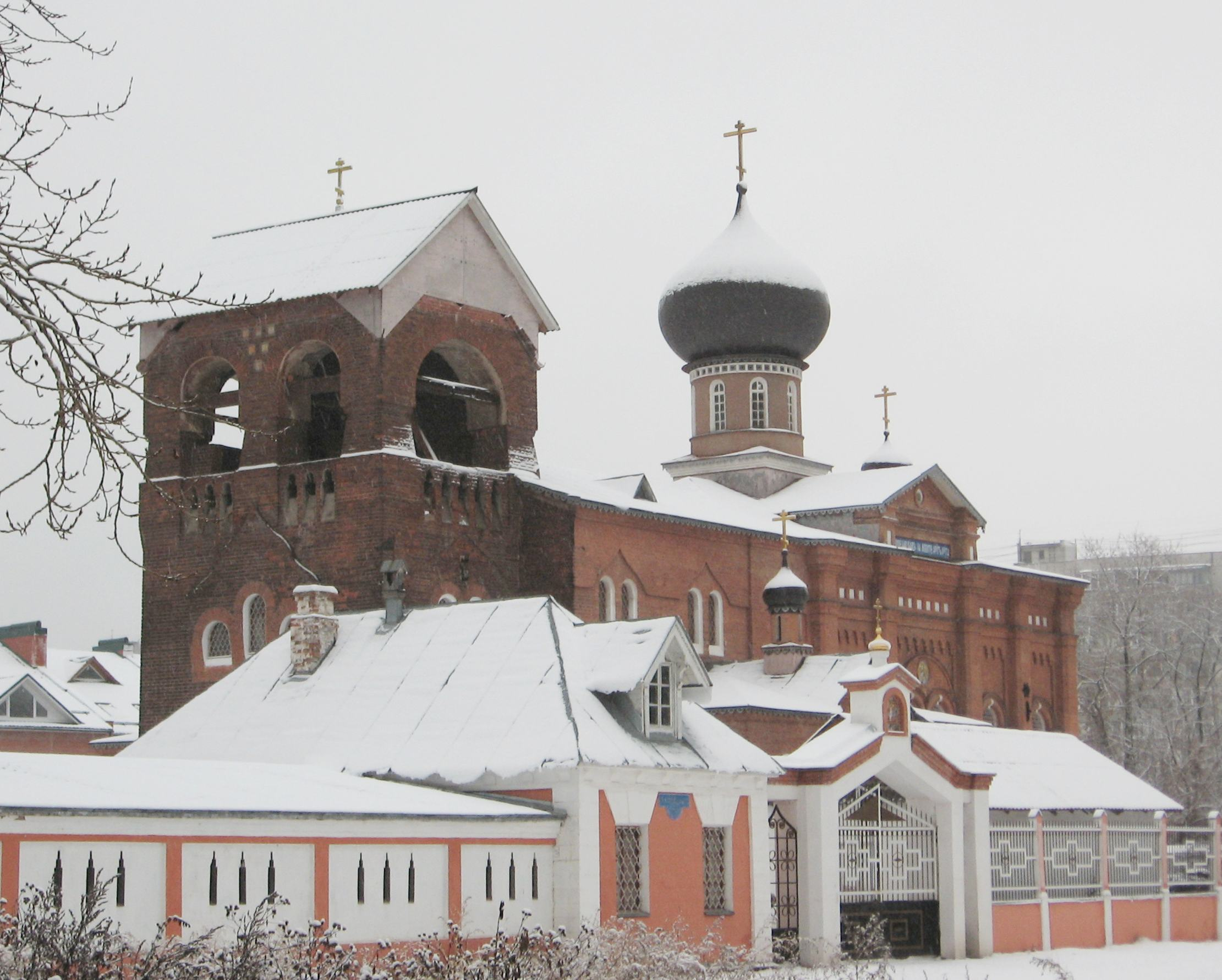 Церковь Рождества Богородицы в Орехово-Зуево (старообрядческая, ул. Кузнецкая)